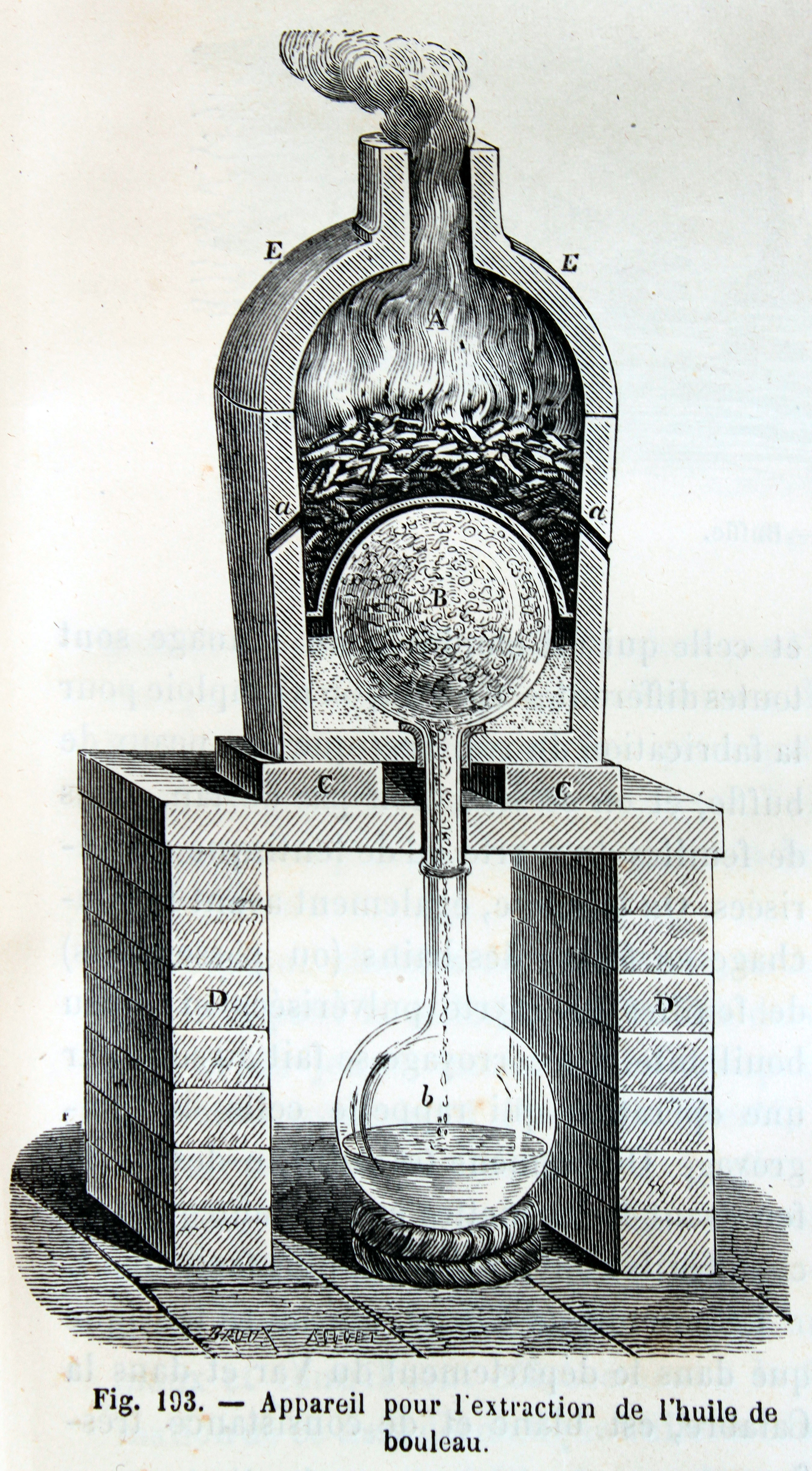 Ilustraciones de la obra : Les merveilles de l'industrie ou, Description des principales industries modernes / par Louis Figuier. - Paris : Furne, Jouvet, [1873-1877]. - Tome II